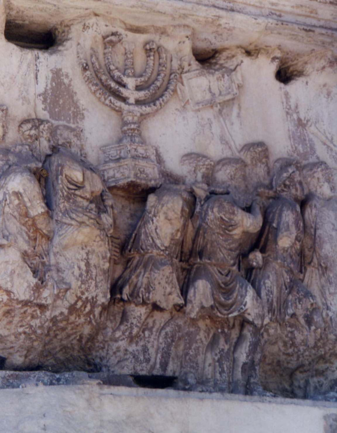 De Menorah uit de tweede Tempel, als oorlogsbuit meegenomen door het Romeinse legioen. Afbeelding van de Triomfboog van Titus, op het Forum Romanum.